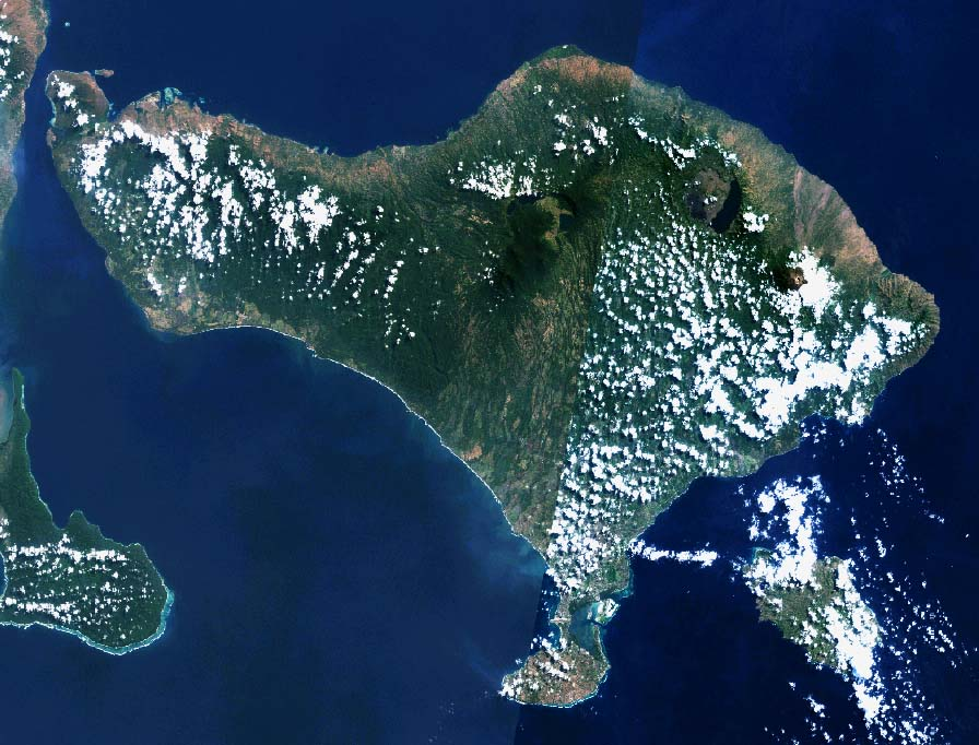 バリ島のLandsat衛星写真